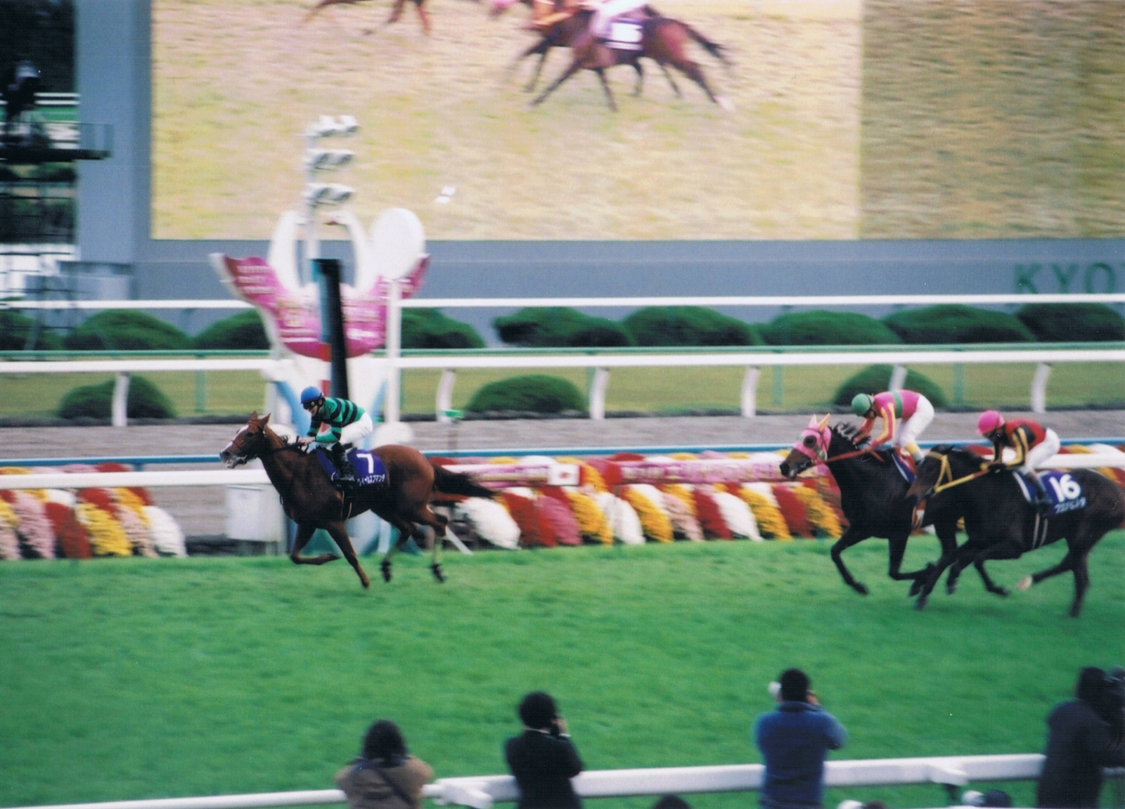 第34回エリザベス女王杯 優勝馬 クイーンスプマンテ号